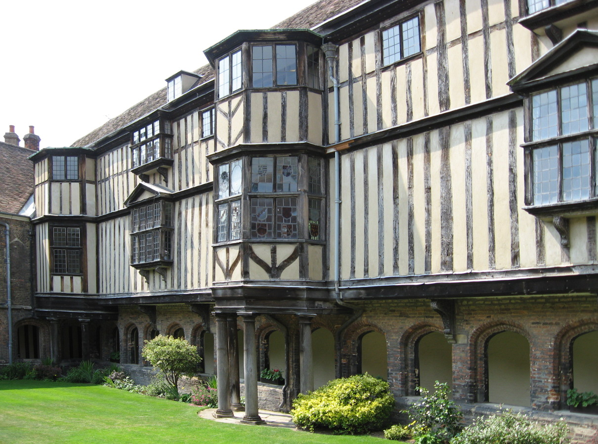 President's Lodge, Queens' College, Cambridge